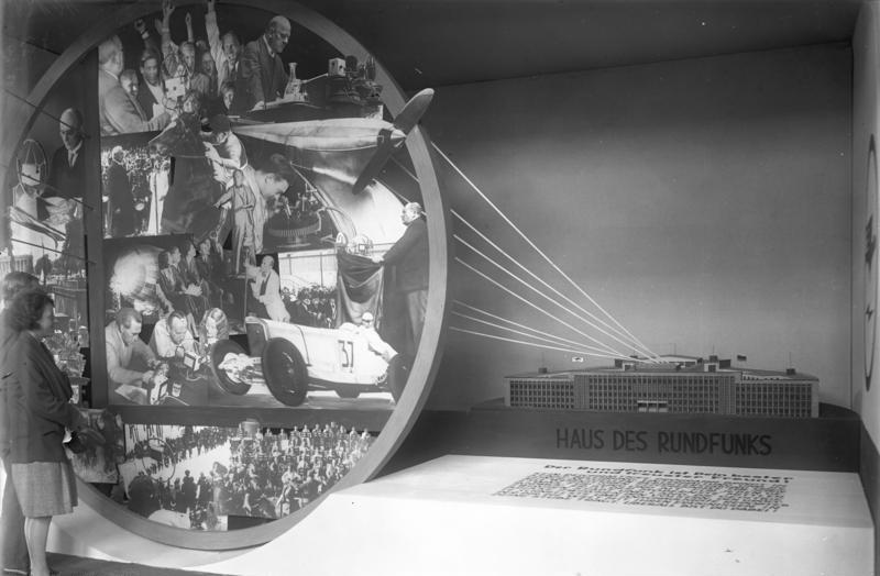 Die Eröffnung der grossen deutschen Funk-Ausstellung in den Ausstellungshallen am Kaiserdamm in Berlin! Der Stand des Berliner Rundfunks. Ein interessanter Überblick über die aktuellen Sendungen der Berliner Funk-Stunde im Jahre 1931.